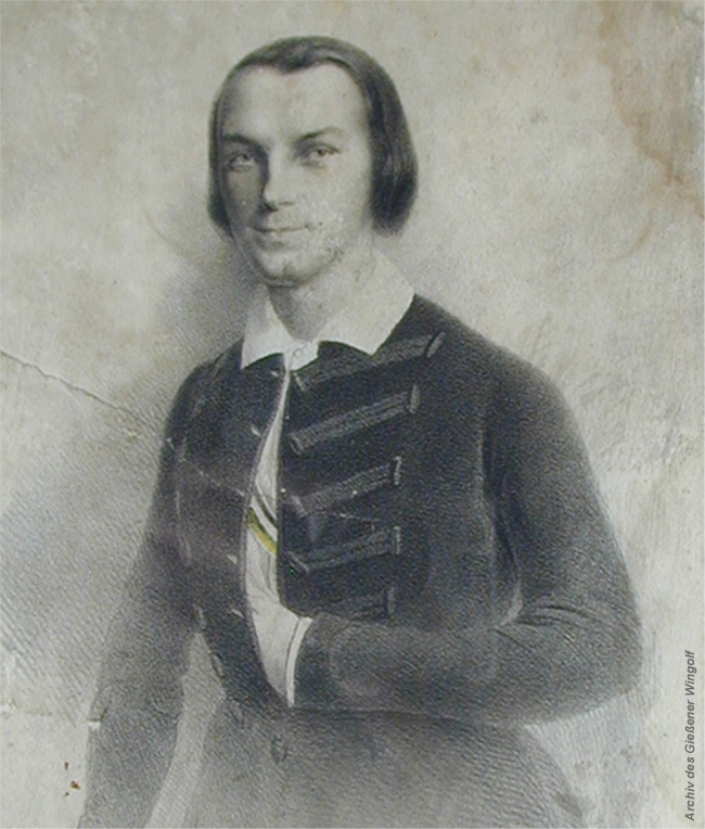 stud. theol. E. Wolff, Gießener Wingolf 1852